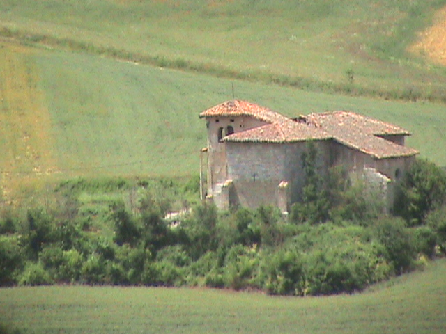 Vista de la Iglesia de Villalbos desde el antiguo "Alto de la Antena"